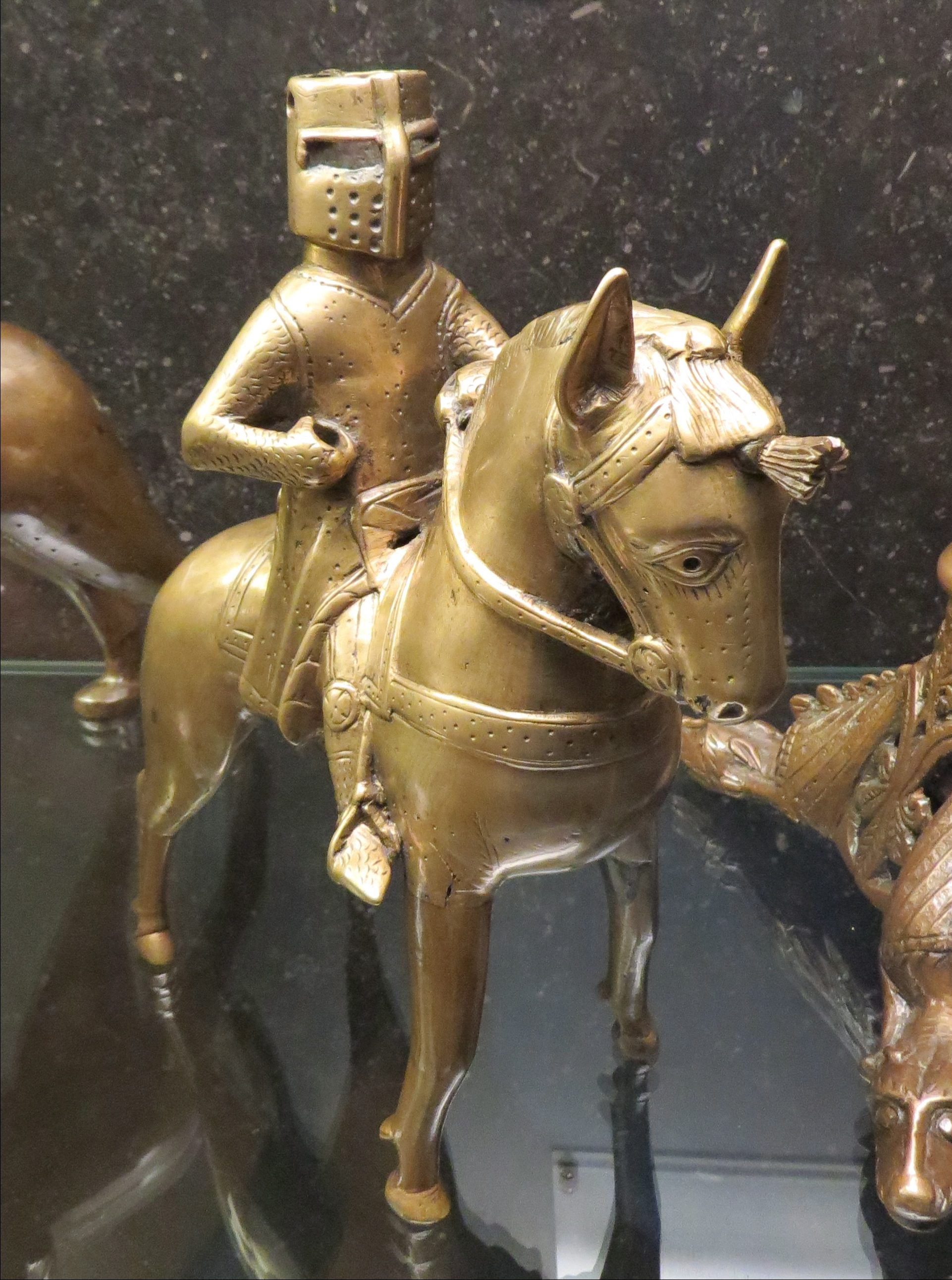 Aquamanile fra ca. 1250, fundet i Trondhjem Stift, Norge, Nationalmuséet i København